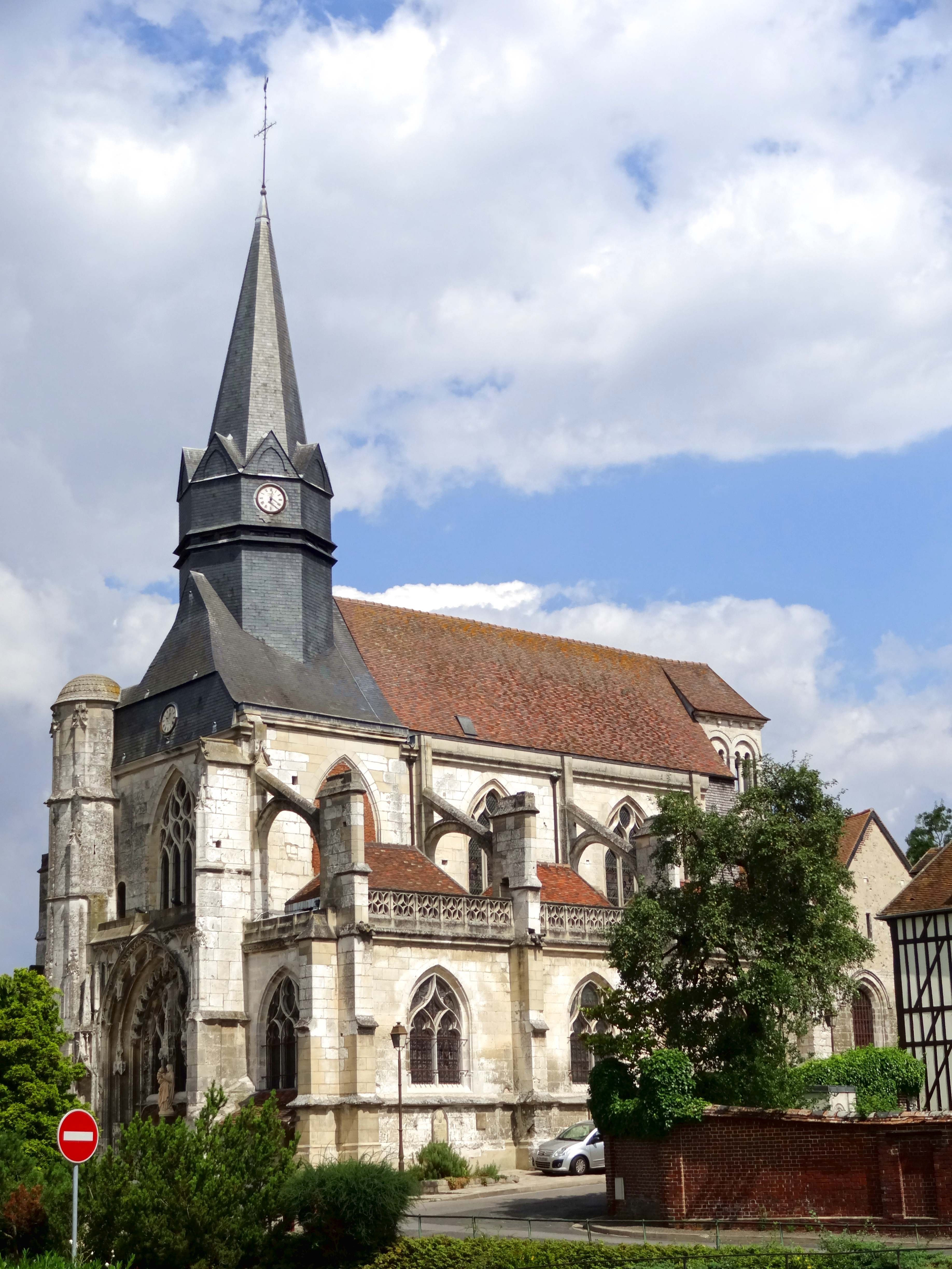 Église Notre-Dame de Marissel - voir titre.